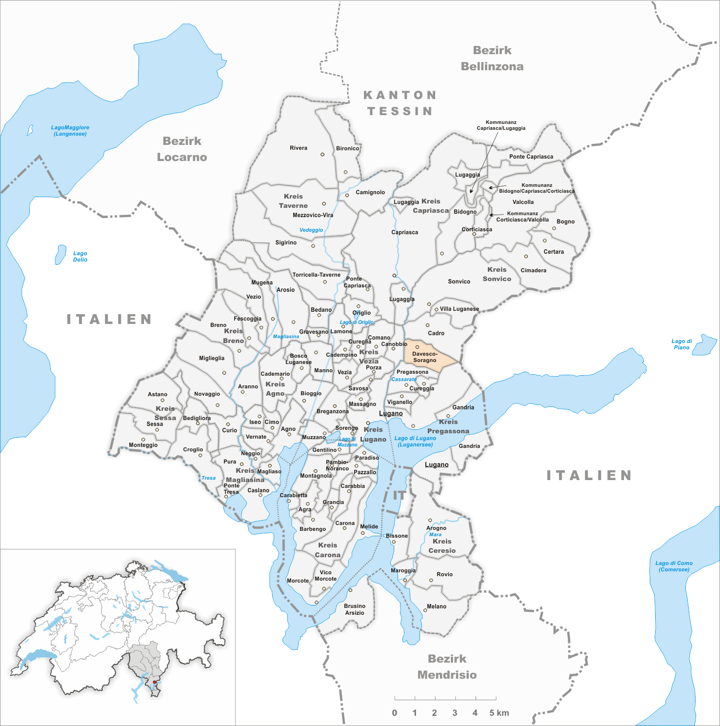 Municipality Davesco-Soragno Artist: Tschubby